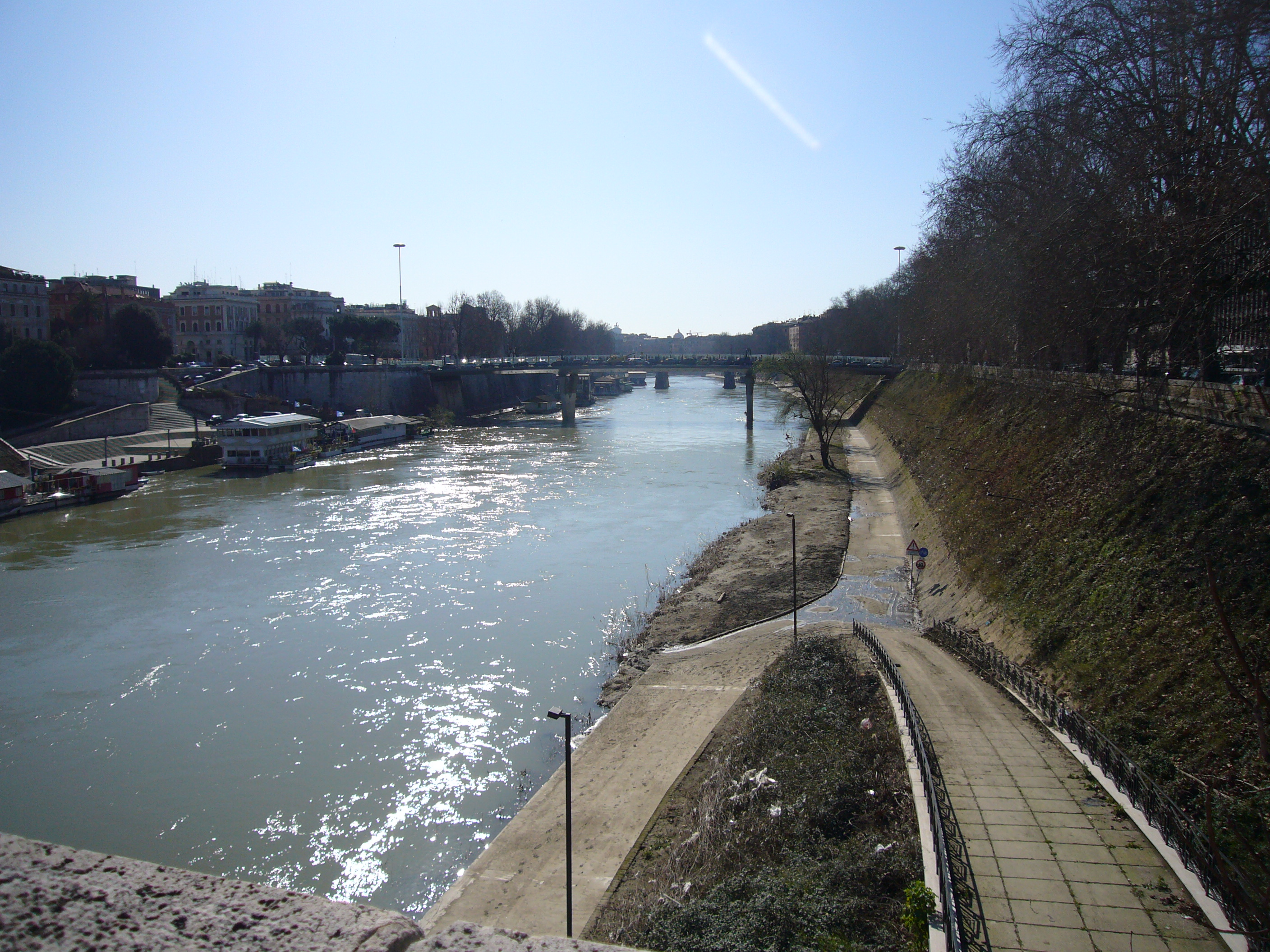 Roma, Lungotevere Michelangelo e ponte Nenni